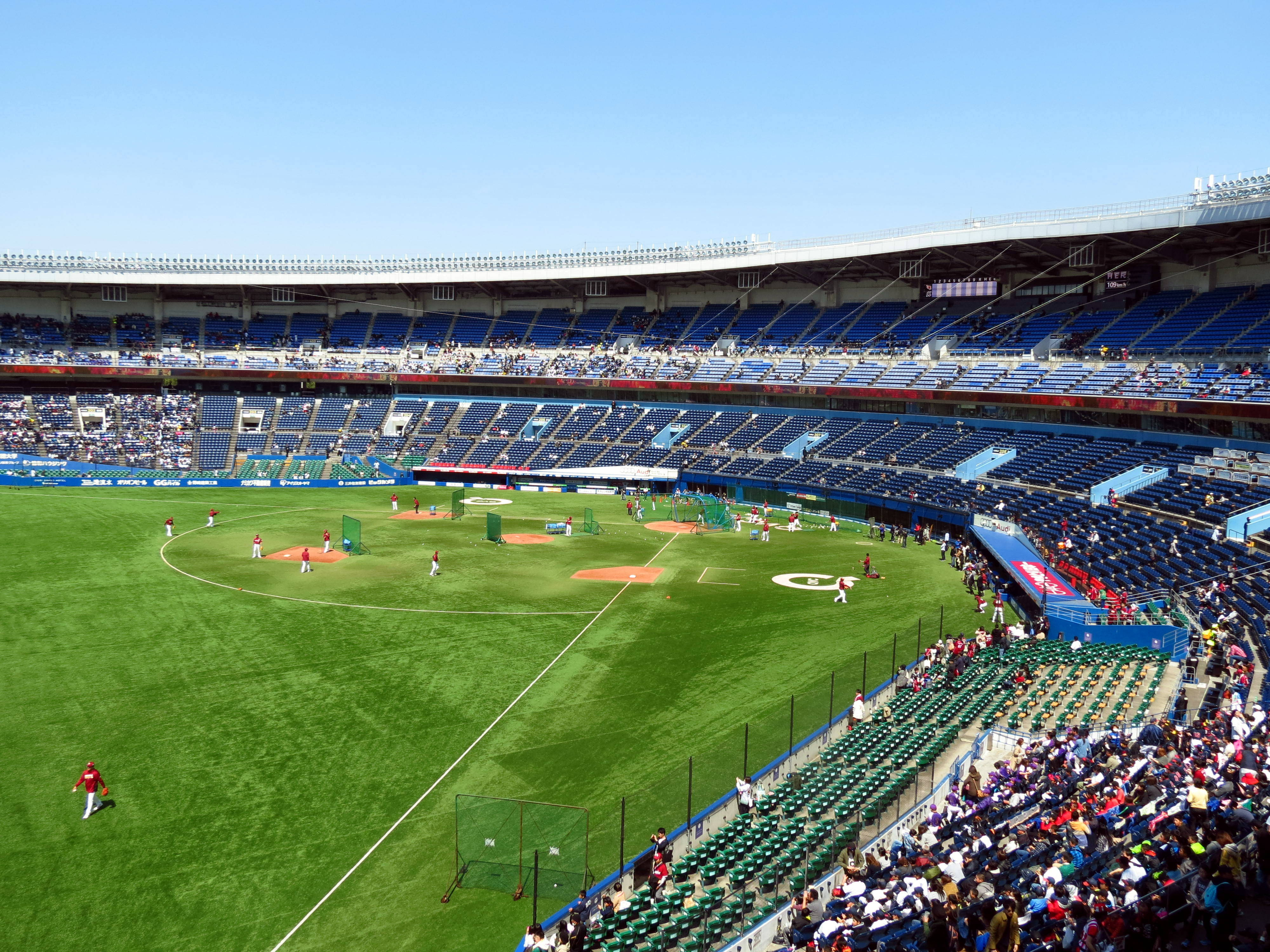 Tohoku Rakuten Golden Eagles at Chiba Lotte Marines